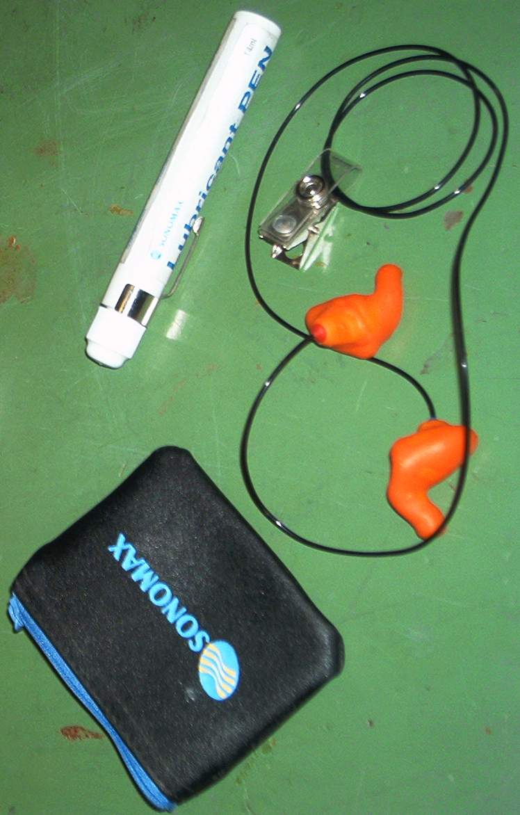 zelfgemaakte foto voor het publiek domein. Martink.